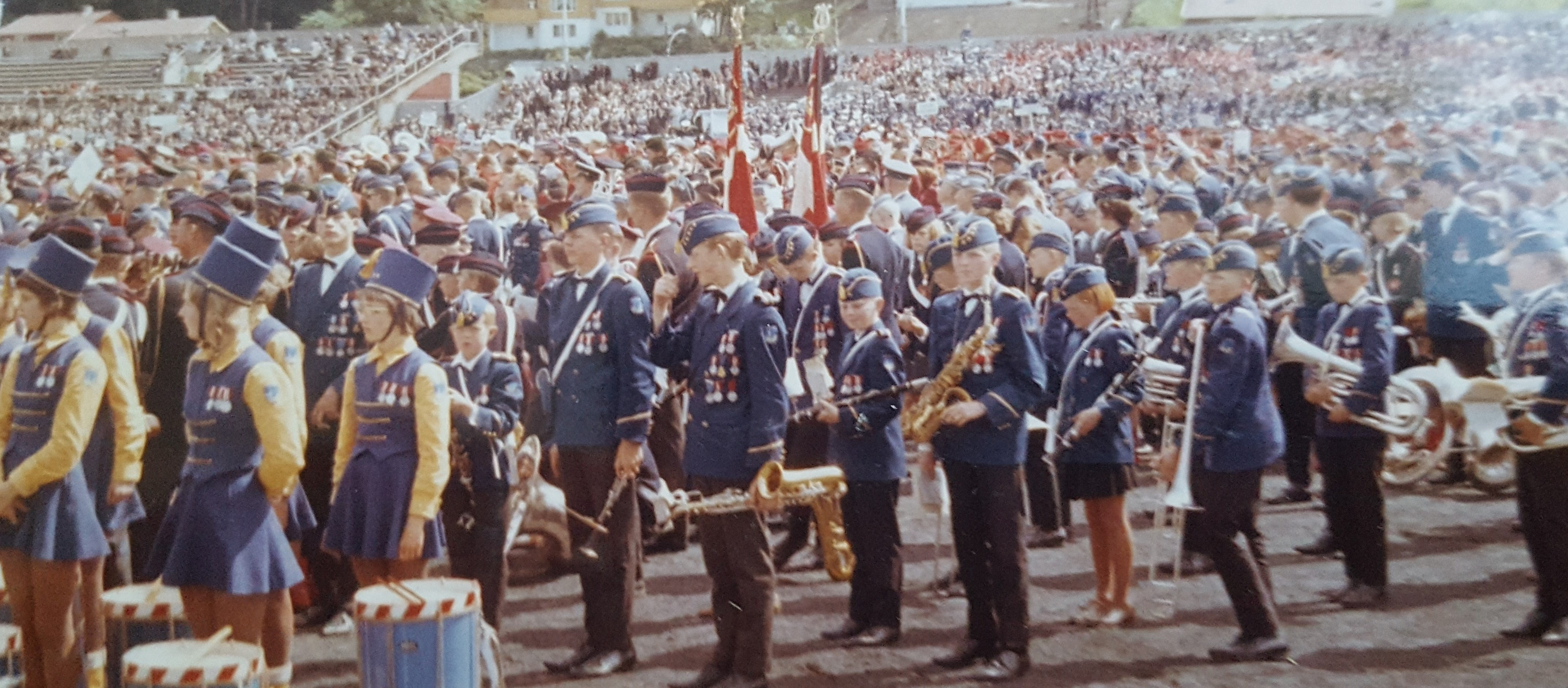 Harstad Folkeskoles Musikkorps deltar på musikkstevne i 1965.